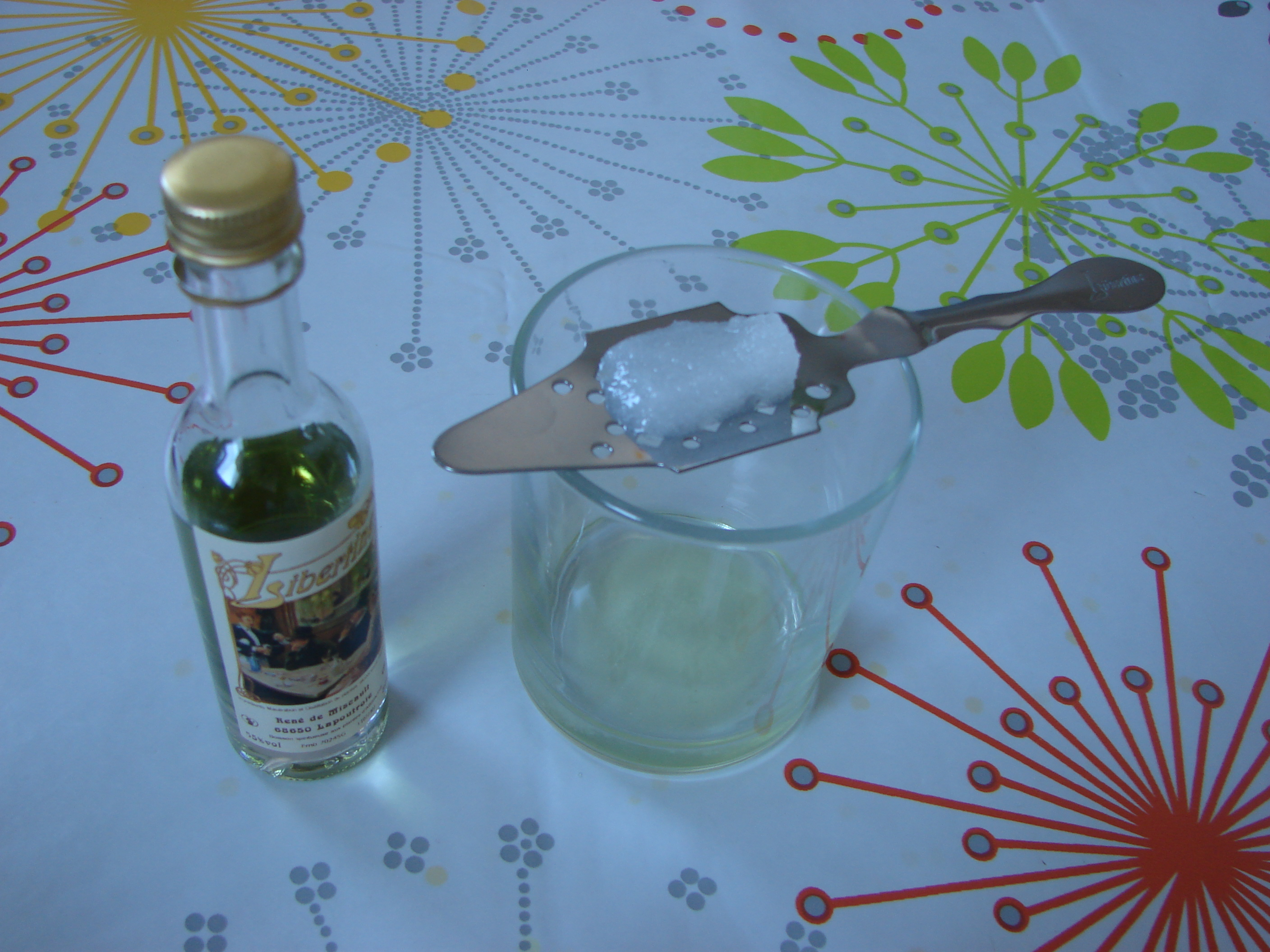 Rituel digestif à base d'absinthe Libertine